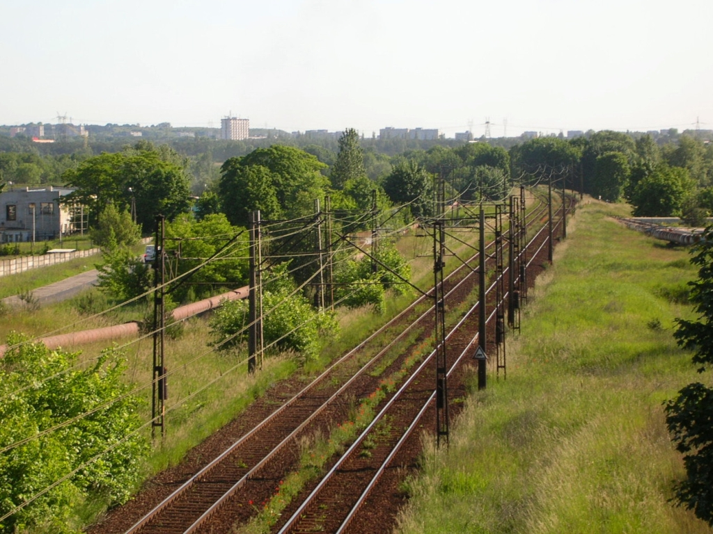 Magistrala węglowa, linia nr 201 w Czersku Polskim w Bydgoszczy